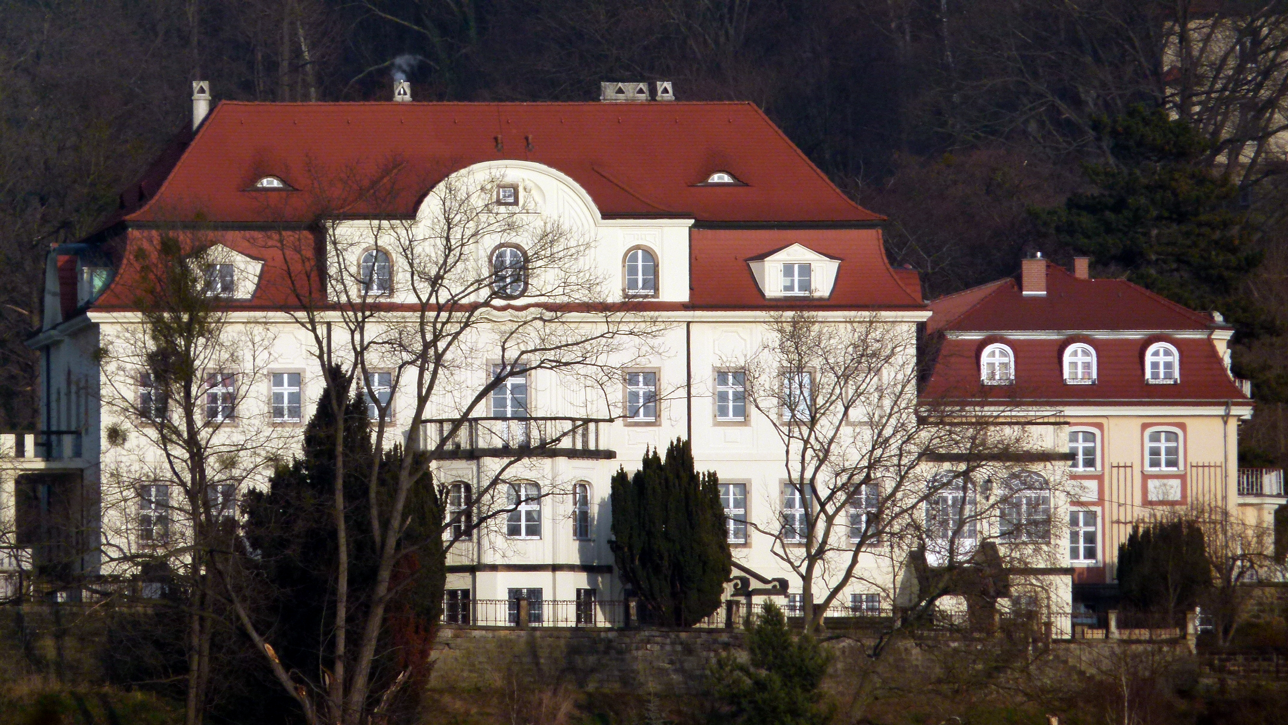 Denkmalgeschützte Villa Wollner, Am Steinberg 14, Wachwitz, Dresden